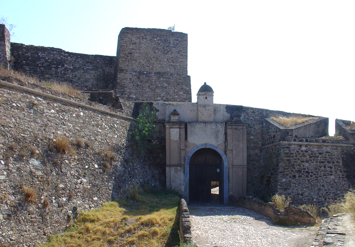 Fortaleza de Juromenha - entrada